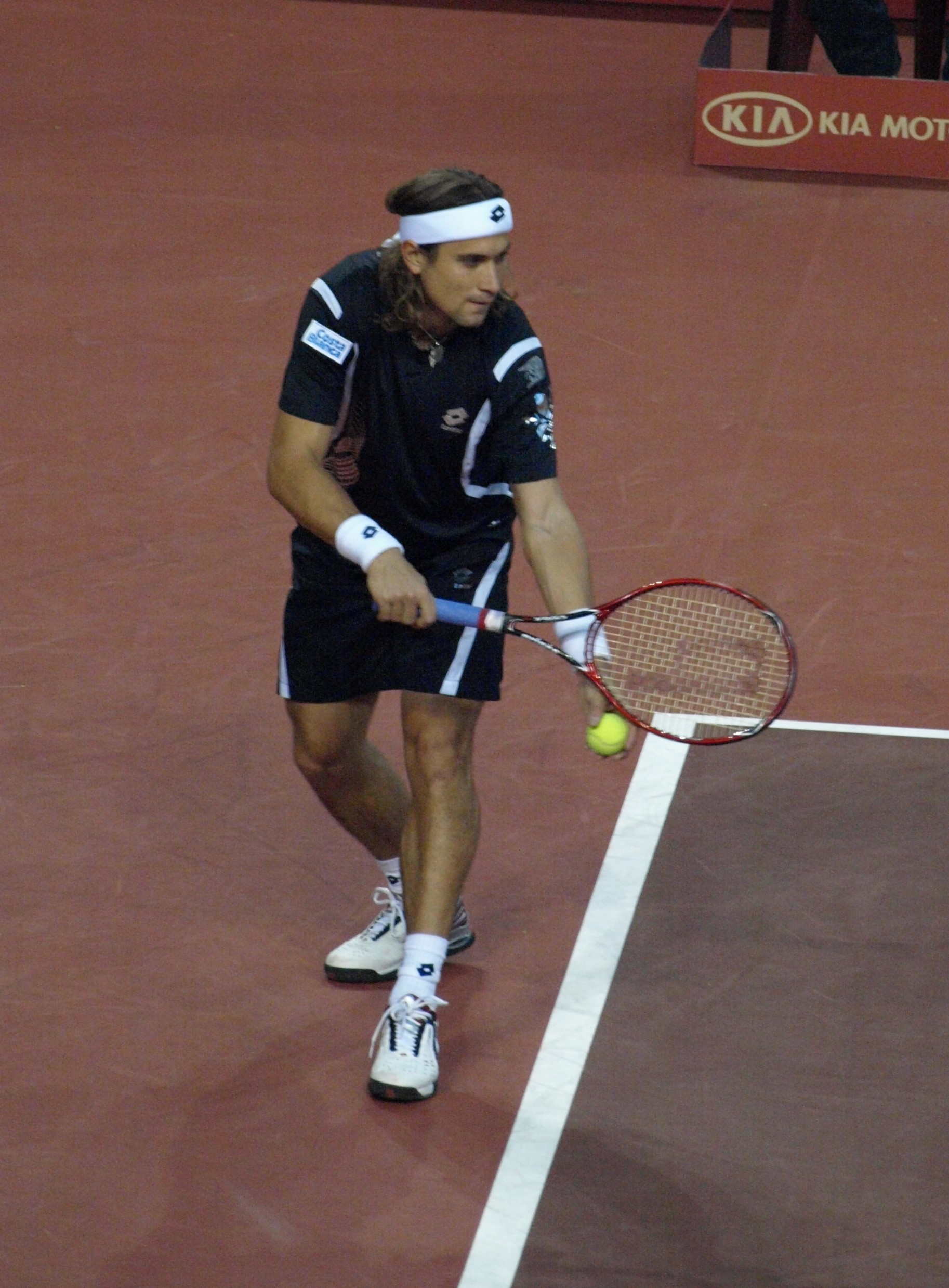 David Ferrer sirviendo en el Master Nacional de Tenis 2007